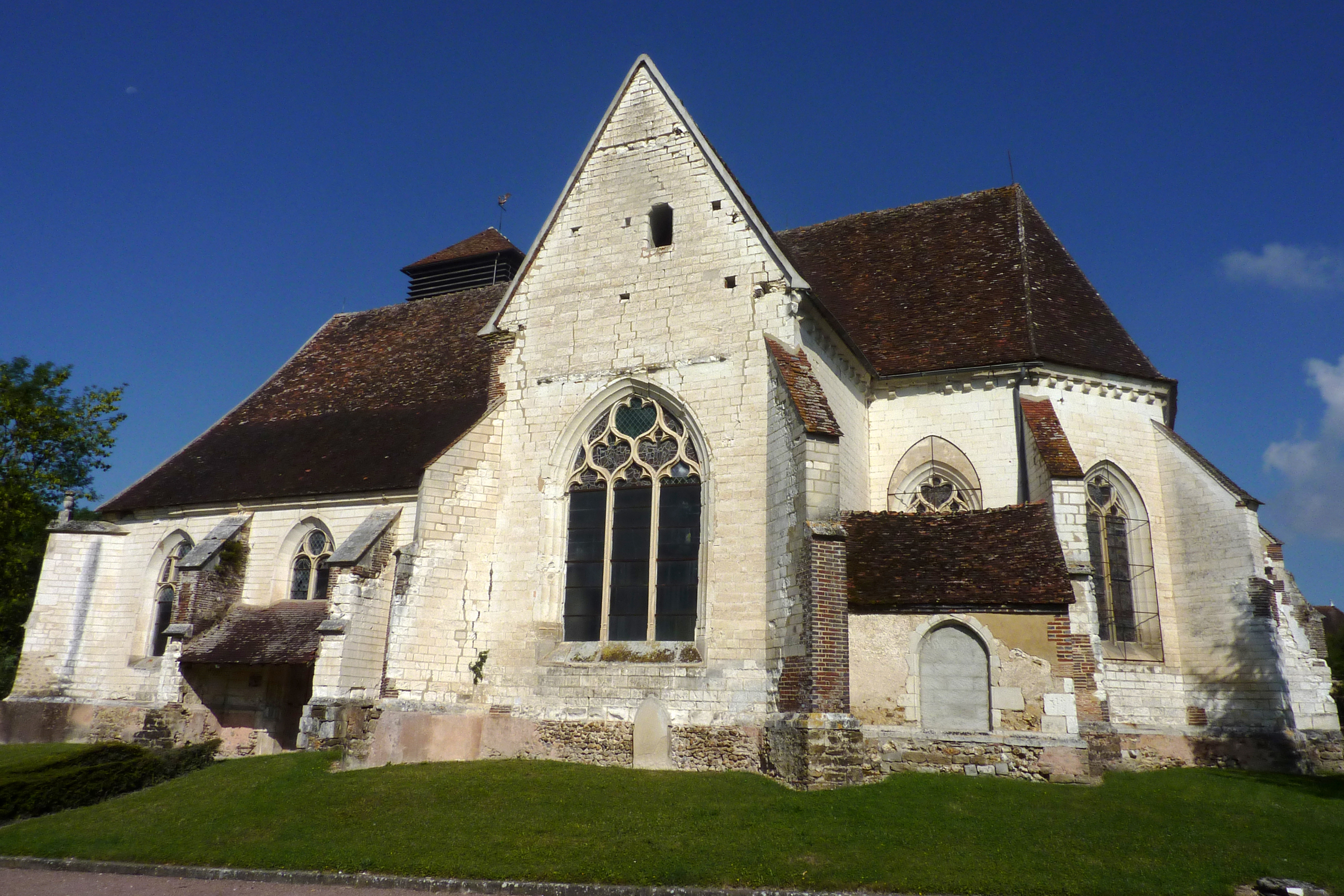 L'église de Lasson (Yonne)